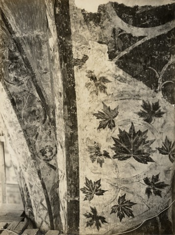 Maestro oltremontano, loggetta di sinistra, dettaglio